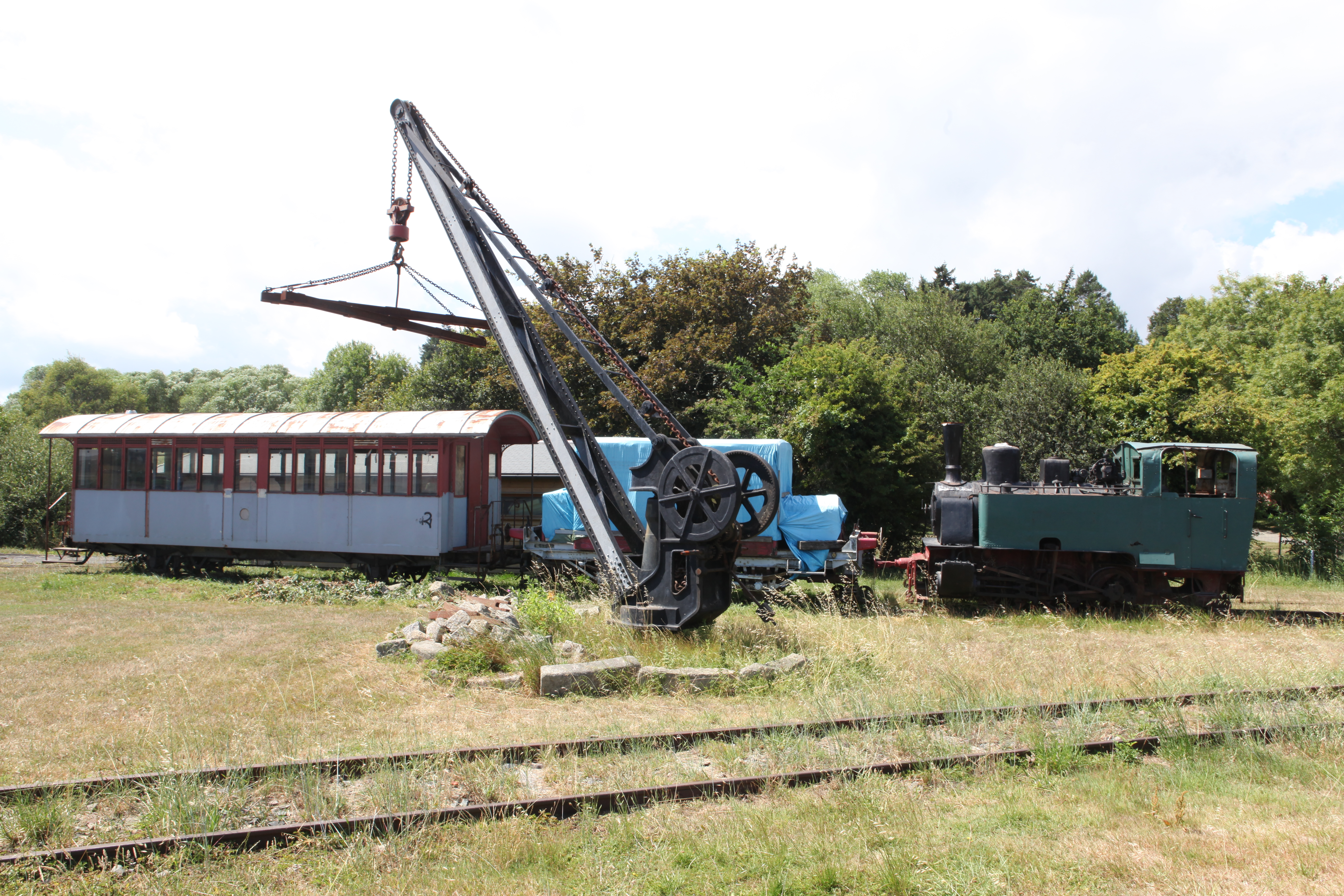 Le Petit Train de la Baie de Saint-Brieuc de l'Association des Chemins de Fer des Cotes-du-Nord à Boutdeville. Á gauche la voiture X 9056 en provenance des Chemins de fer Rhétiques, Suisse